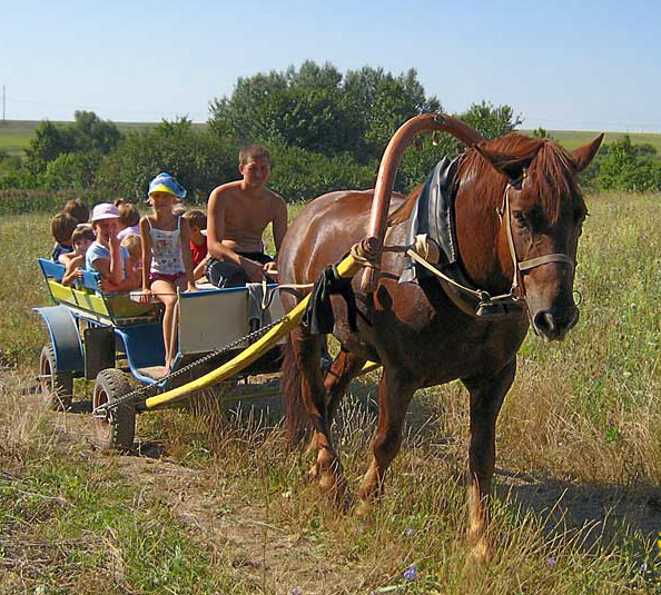 Праздник Яблочного Спаса в родовом экопоселении "Кореньские родники". Шебекинский район Белгородской области.